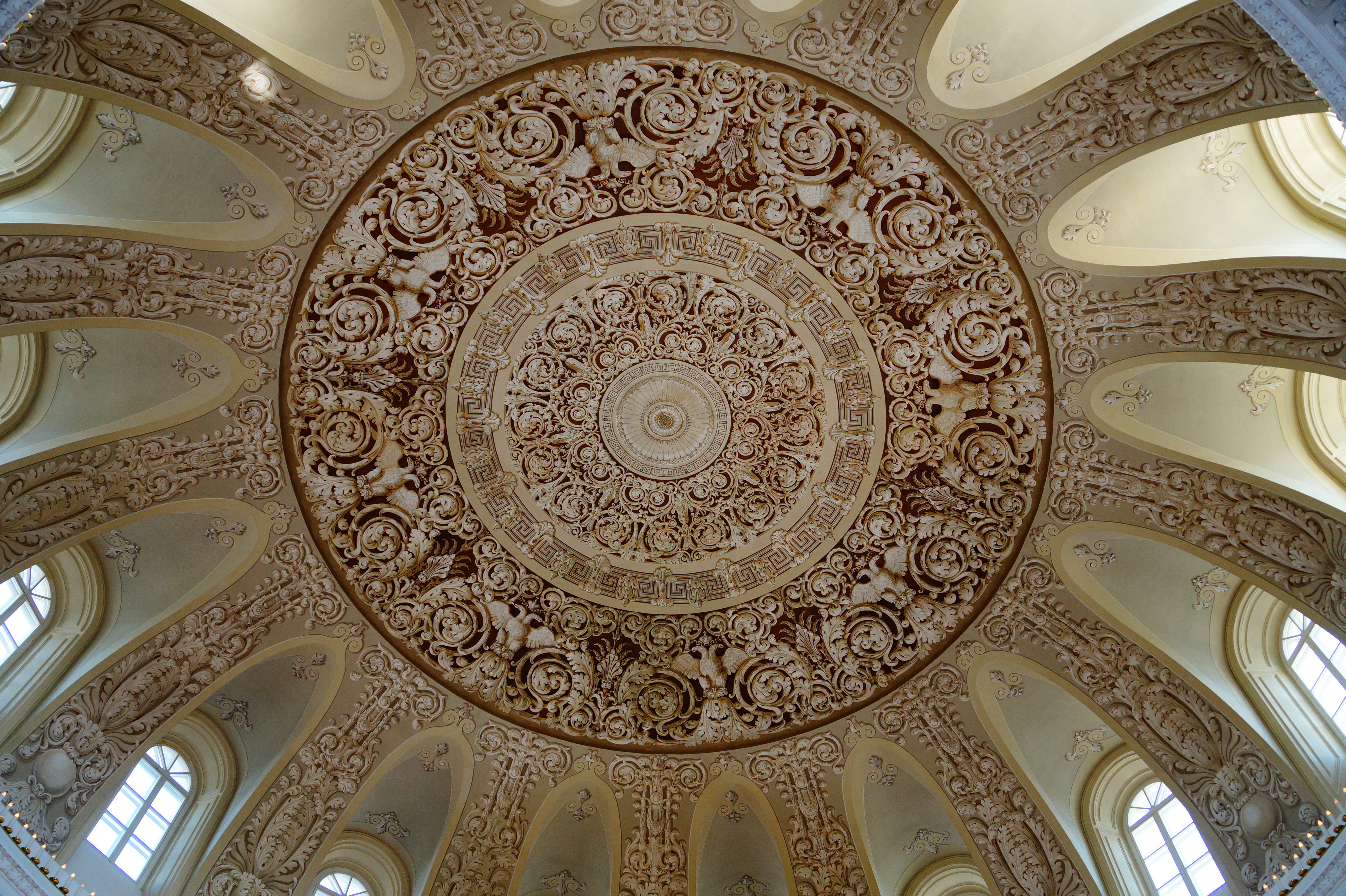 Петровский Путевой дворец: Ленинградский просп., дом 40, Аэропорт, Северный округ, Москва